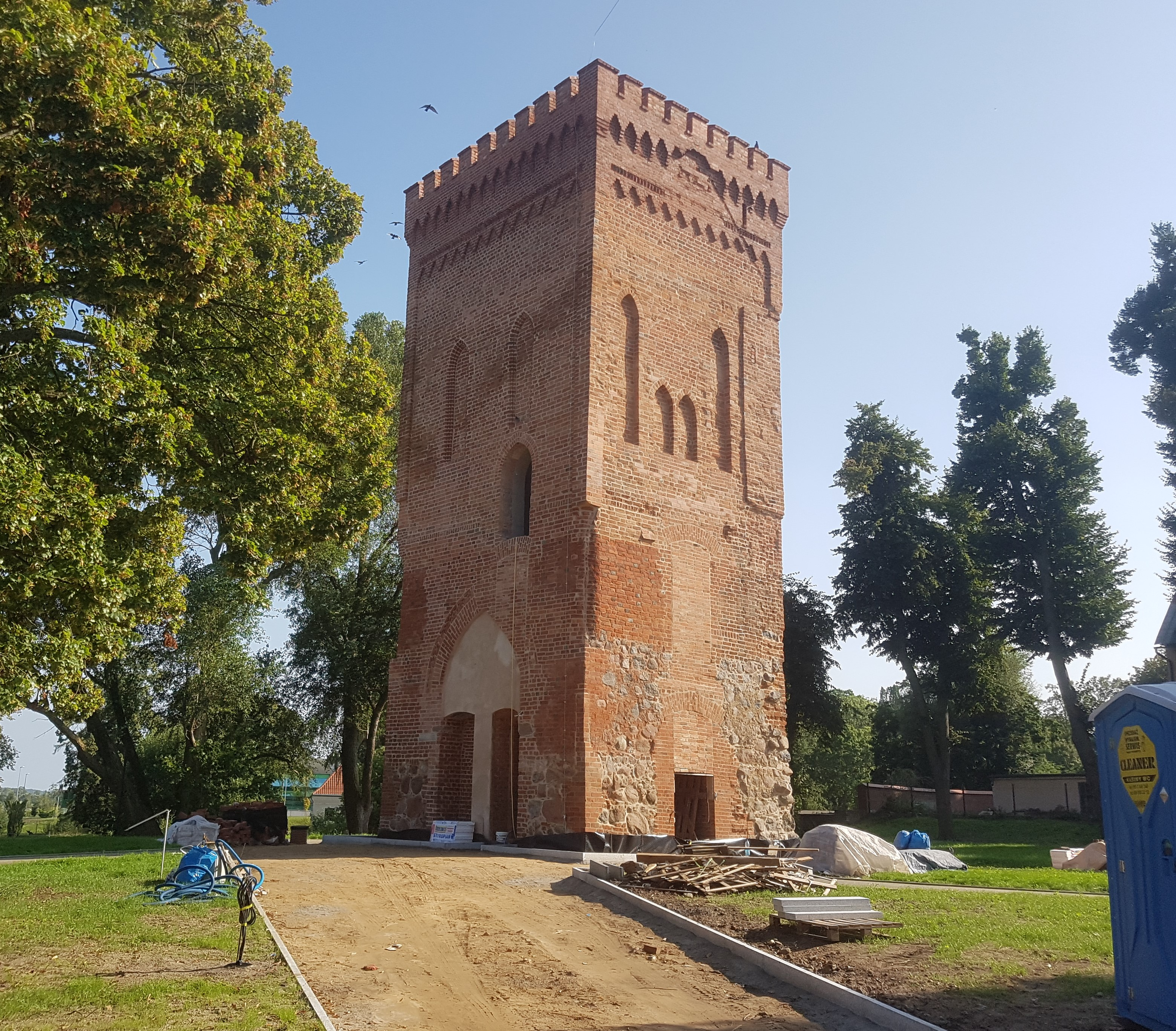 Wieża Bramna zamku biskupów warmińskich w Braniewie (2019)